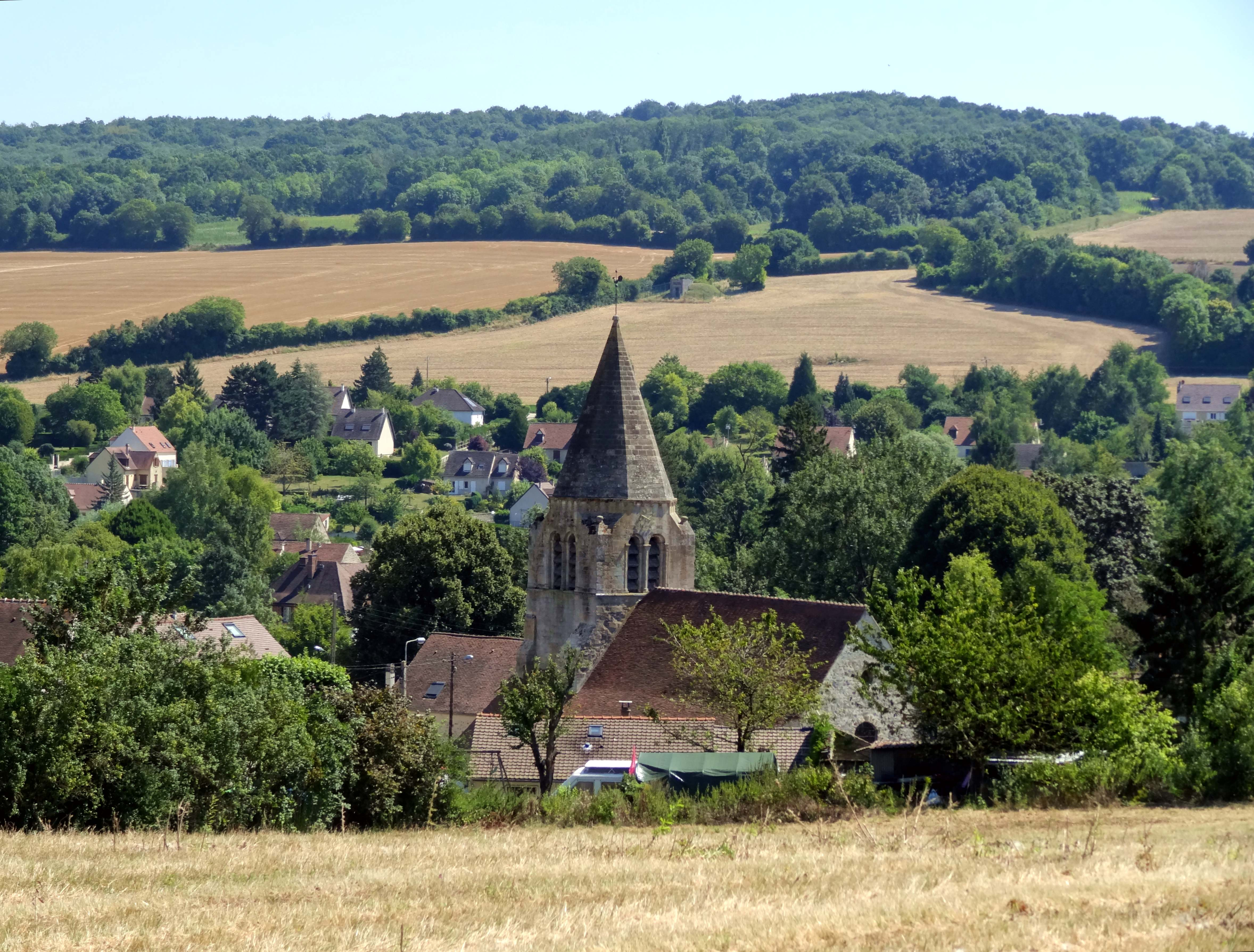 Église Saint-Nicolas de Tessancourt-sur-Aubette - voir titre.